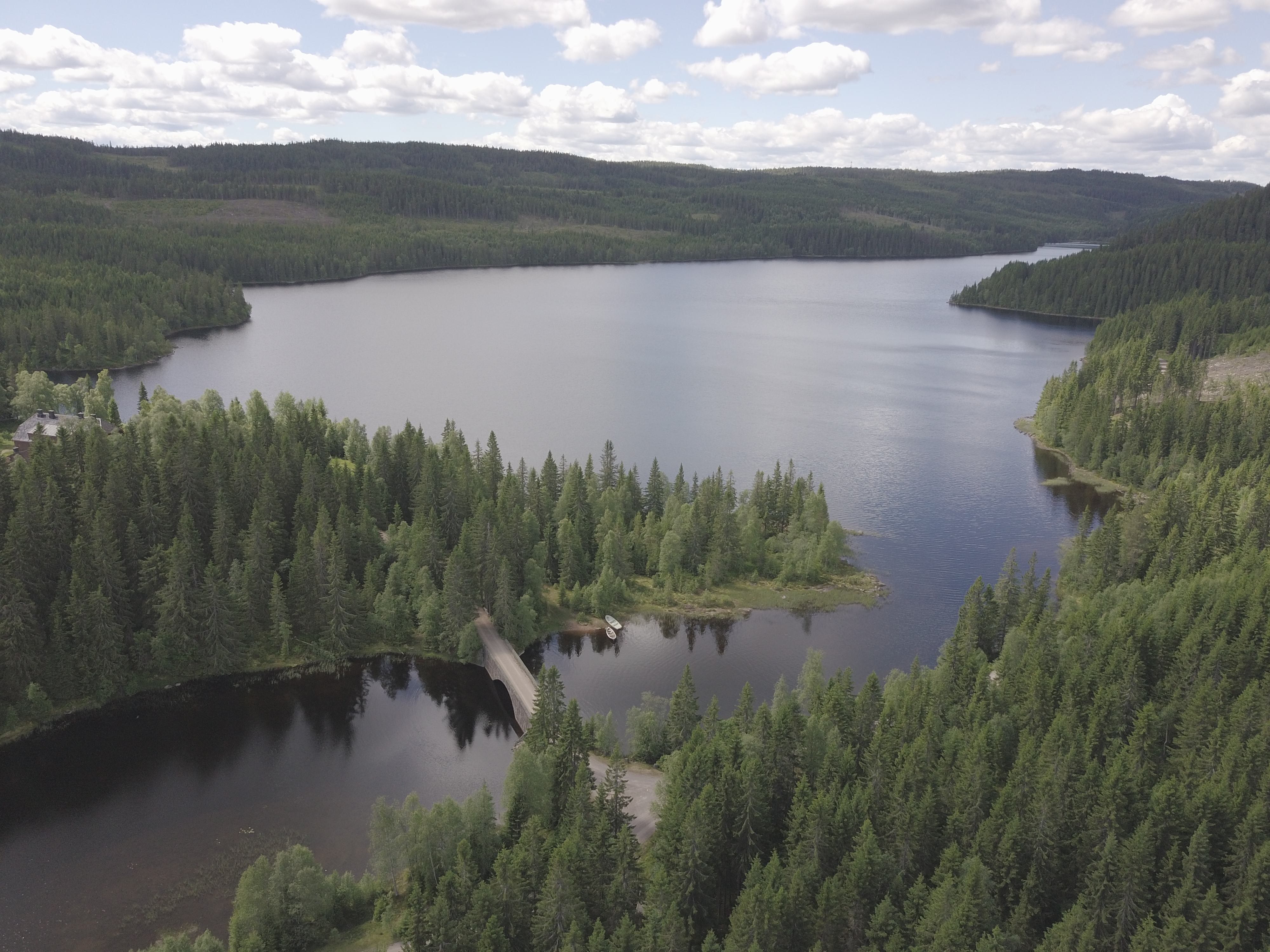 Råsjøen i Romeriksåsen